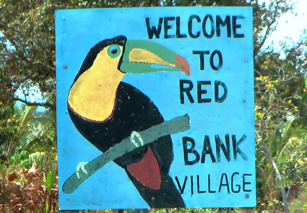 Ortsschild Red Bank